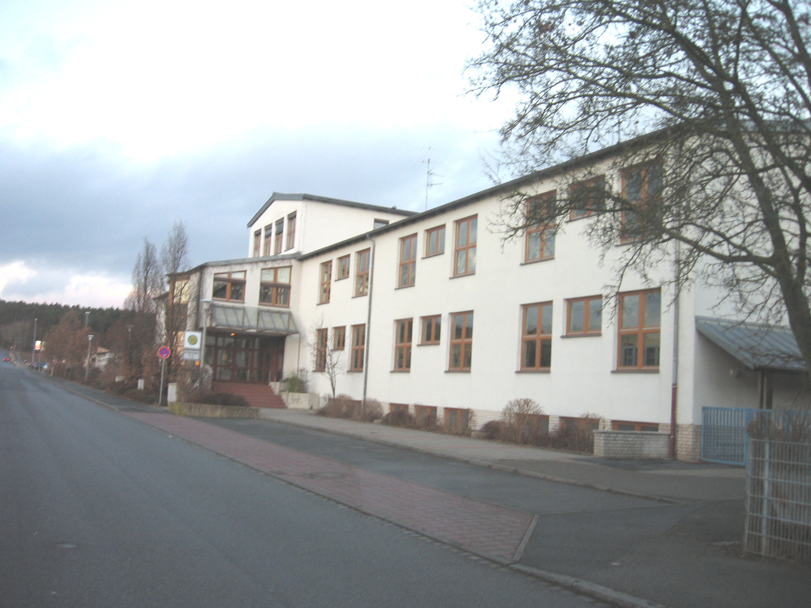 Volksschule Wintersdorf, Frankenstr. 8, an der Gemeindestraße nach Bronnamberg